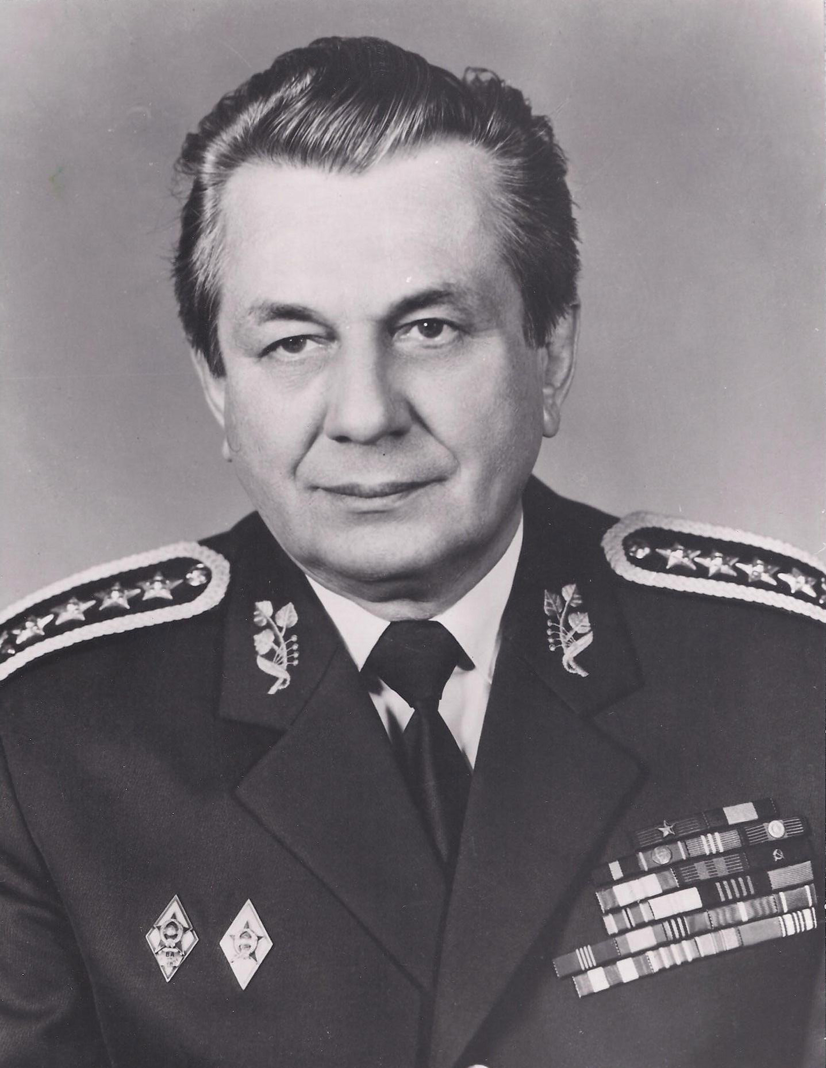 Armádny generál Milán Václavík minister národnej obrany ČSSR v rokoch 1985 až 1990